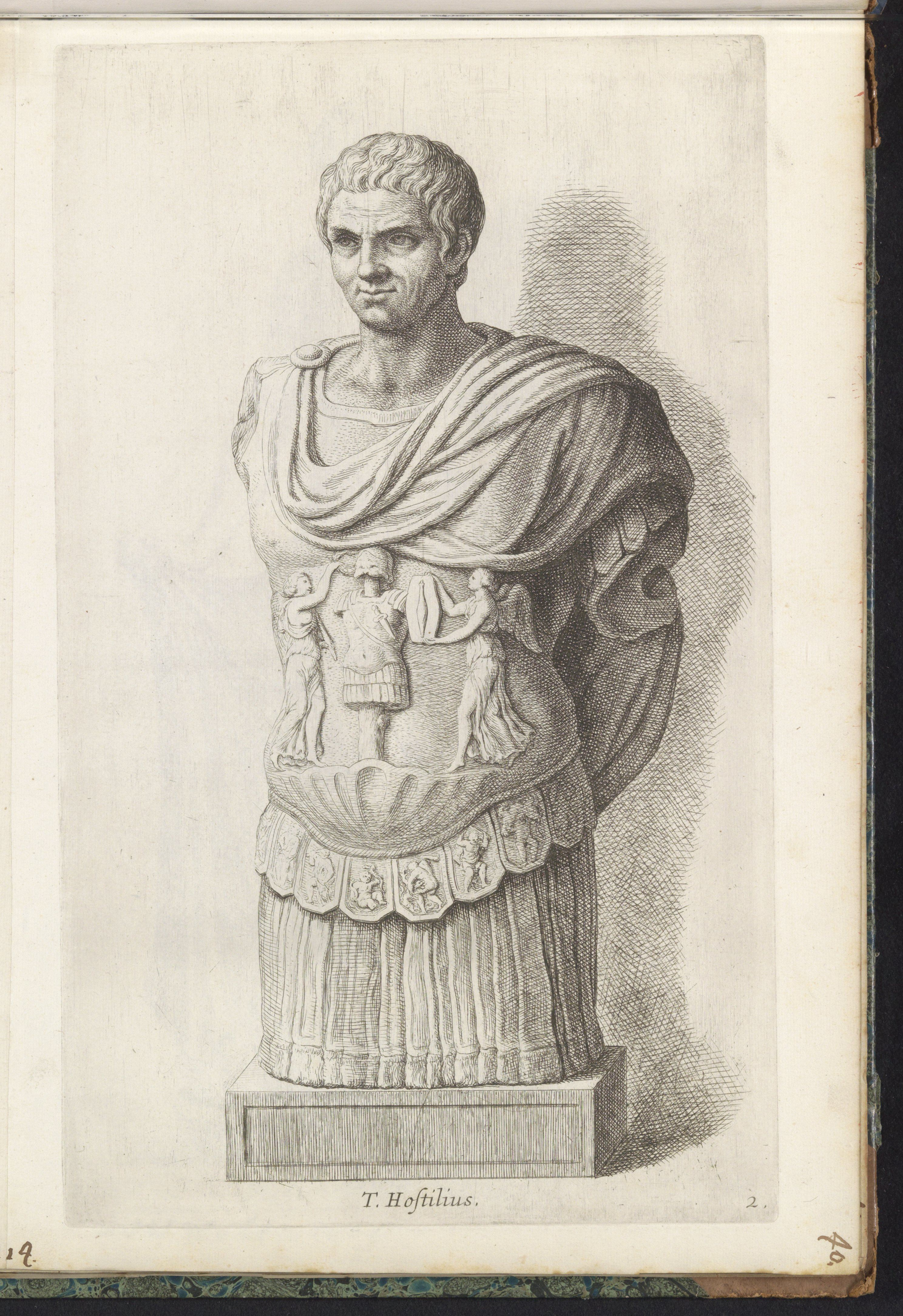 IdentificatieTitel(s): Sculptuur van Tullus HostiliusT. Hostilius (titel op object)Objecttype: prent albumblad Serienummer: 2/98Objectnummer: RP-P-2016-591-40-2Opschriften / Merken: nummer, rechtsboven recto, handgeschreven: ‘40’ (Nummering van de albumbladen 34 t/m 88 door Michiel Hinloopen)Omschrijving: Klassieke sculptuur van een Romeinse militair in harnas. Op zijn harnas de personificaties van Overwinning bij een wapenuitrusting. De linker vrouw heeft een lauwerkrans vast, de rechter een schild met een scepter. Aan de onderkant van het kuras mogelijk voorstellingen van de daden van Hercules. De prent maakt deel uit van een album met een serie prenten naar de sculpturen in de verzameling van Gerard Reynst.VervaardigingVervaardiger: prentmaker: Hubert Quellinusprentmaker: Gerard de Lairesse (verworpen toeschrijving)Plaats vervaardiging: AntwerpenDatering: 1646 - 1670Fysieke kenmerken: gravureMateriaal: papier Techniek: graveren (drukprocedé)Afmetingen: plaatrand: h 325 mm × b 196 mmOnderwerpWat: piece of sculpture, reproduction of a piece of sculptureVerwerving en rechtenCredit line: Bruikleen van de Rijksacademie van Beeldende KunstenVerwerving: bruikleen 1979Copyright: Publiek domein